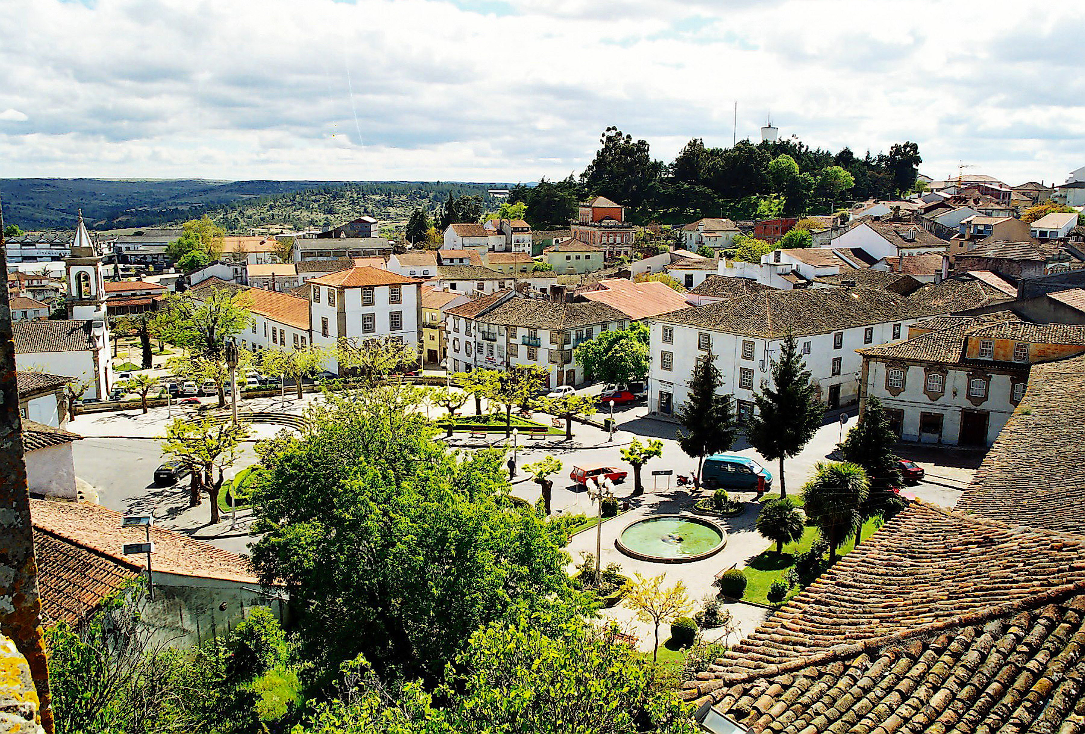 Pinhel Fotografia de Vitor Oliveira, integrada na colecção com o endereço